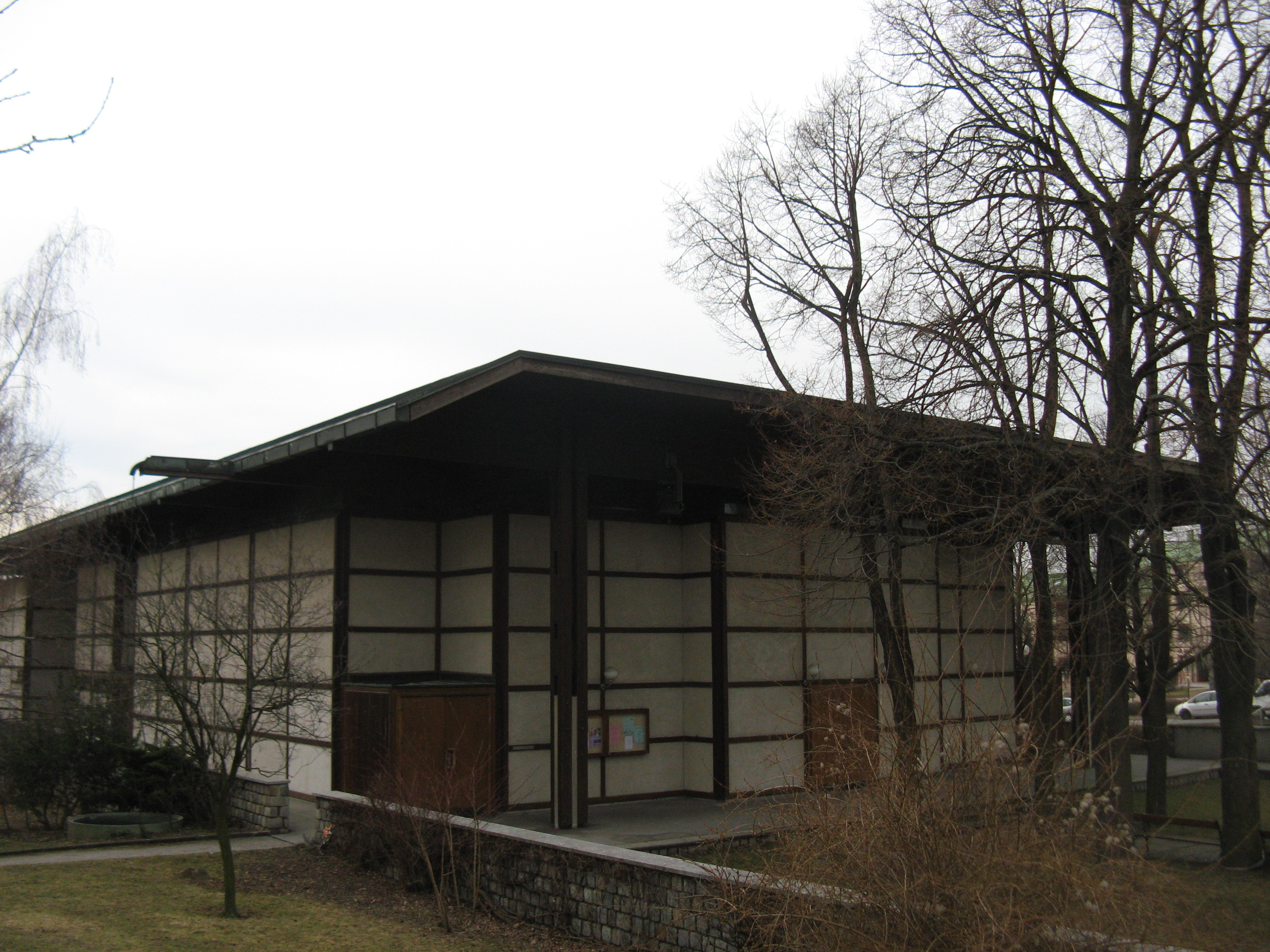 Pfarrkirche Salvator am Wienerfeld (1978-79) von Johannes Spalt, Neilreichgasse 143, Wien-Favoriten